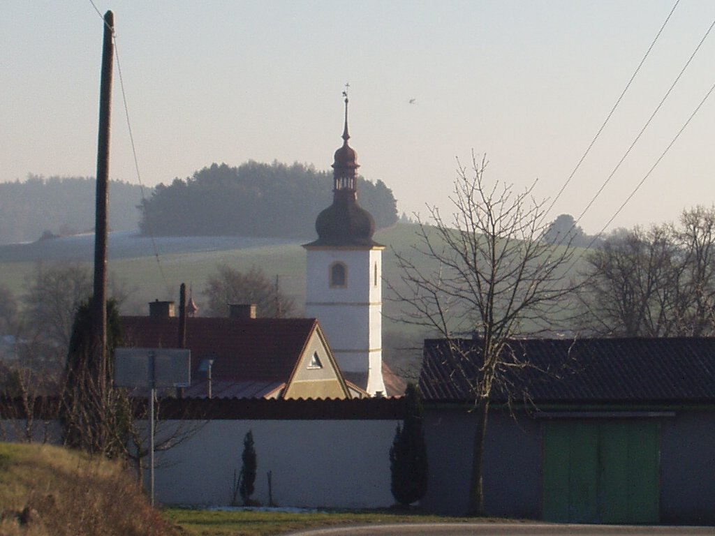 pohled na obec Radomysl - kostel sv. Martina.